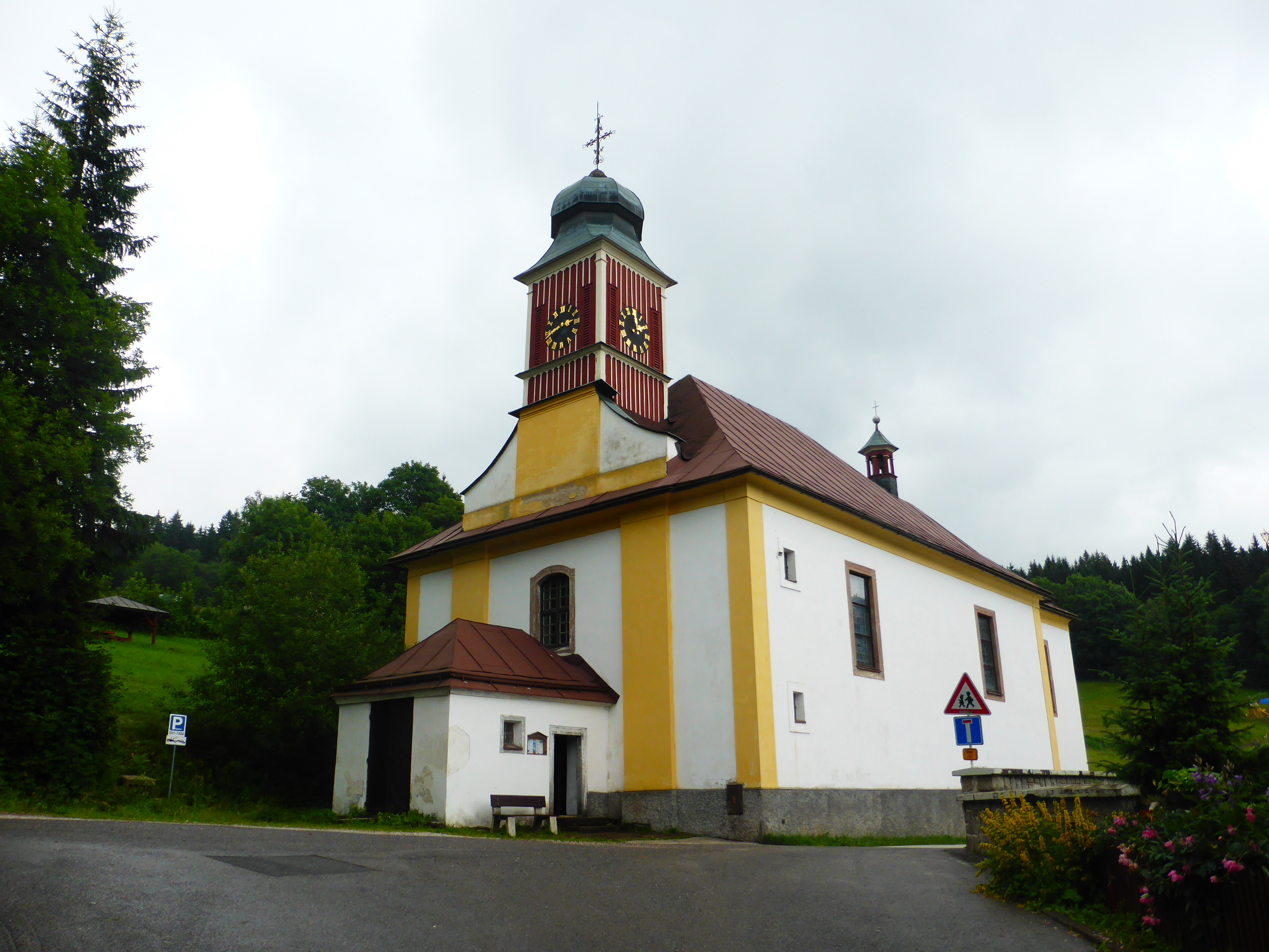 Kościół św. Piotra w Spindlerowym Młynie (Karkonosze)